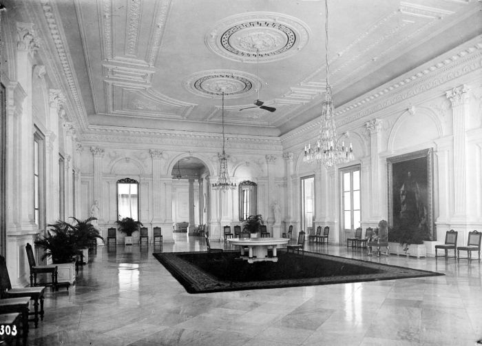 Repronegatief. Zaal in het paleis van de Gouverneur Generaal, Batavia